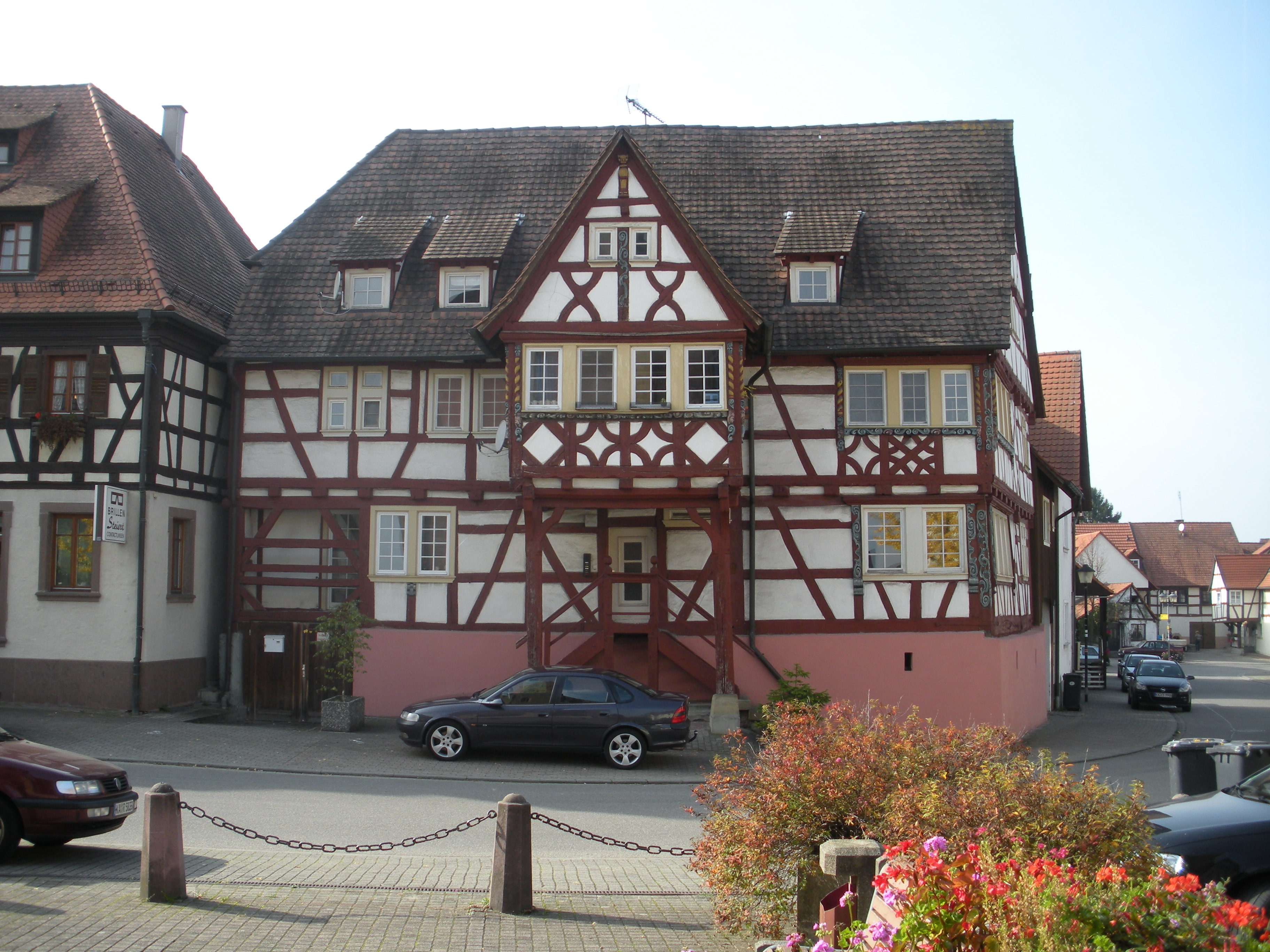 Alte Schmiede in Kraichtal-Münzesheim, Unterdorfstraße 17 (siehe Erwin Huxhold: Die Fachwerkhäuser im Kraichgau. Ein Führer zu den Baudenkmälern. Hrsg. vom Heimatverein Kraichgau, 3. ergänzte Auflage, Ubstadt-Weiher 2002, S. 178-181, ISBN 3-89735-185-4)